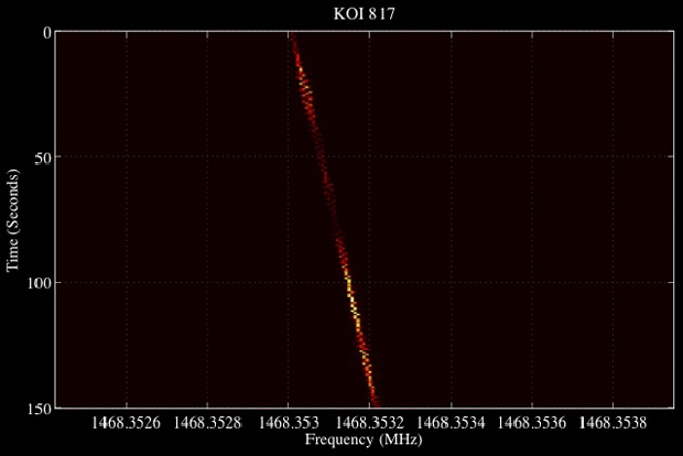 Радиосигнал, полученный радиоастрономами от звезды KOI-817. По оси X отложена частота сигнала, по оси Y время в секундах. Смещение частоты свидетельствует об изменении положения источника сигнала в результате доплеровского сдвига. Источник: NRAO/AUI